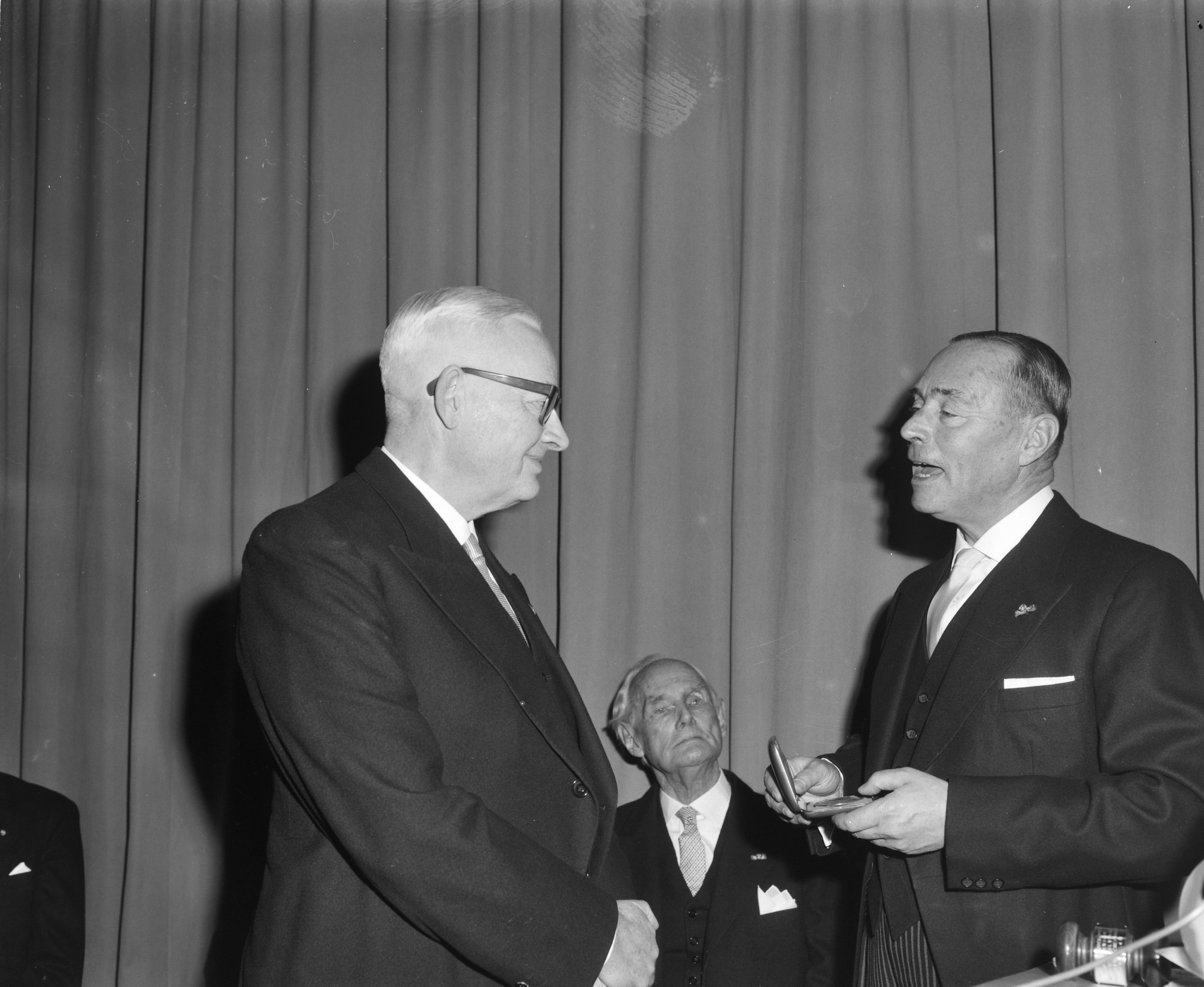 Collectie / Archief : Fotocollectie Anefo Reportage / Serie : [ onbekend ] Beschrijving : Generaal Snijders medaille uitgereikt, v.l.n.r. pr. dr. ir. Van der Maas , dr. ir. M.H. Damme en I.A. Aler Datum : 17 december 1962 Trefwoorden : generaals, medailles Persoonsnaam : ALER I.A., Dr. Ir. M.H. Damme, Generaal Snijders, pr. dr. ir. Van der Maas Fotograaf : Bilsen, Joop van / Anefo Auteursrechthebbende : Nationaal Archief Materiaalsoort : Negatief (zwart/wit) Nummer archiefinventaris : bekijk toegang 2.24.01.04 Bestanddeelnummer : 914-6191